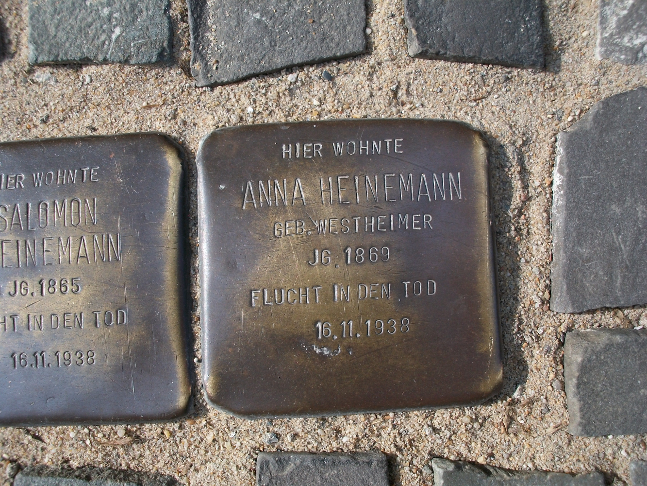 Stolperstein Anna Heinemann geb. Westheimer